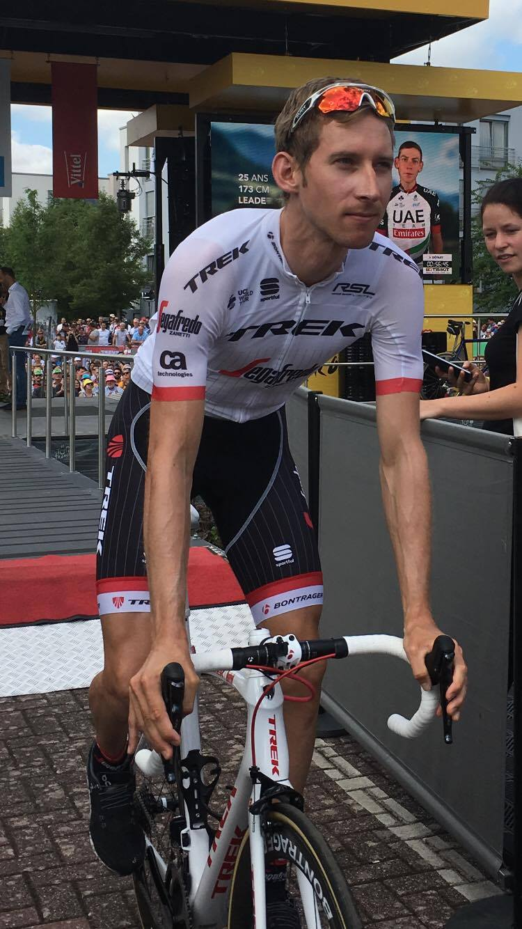 Bauke Mollema (Trek) au départ de la 4ème étape du Tour de France 2017 à Mondorf-les-Bains (Luxembourg)